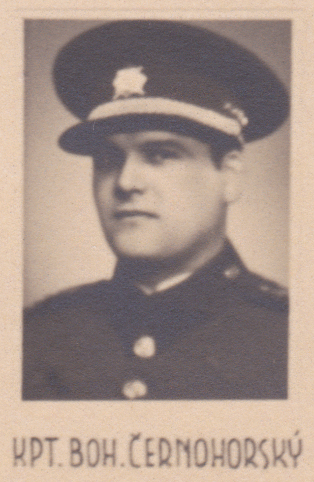 Bohumír Černohorský (* 1903, Rakovník - 1942, Mauthausen, Rakousko) byl československý voják, protinacistický odbojář a příslušník ilegální vojenské odbojové organizace Obrana národa. Po německé okupaci a rozpuštění československé branné moci působil ve vedení Obrany národa, kde se podílel na vytváření Zemských velitelství Obrany národa v Čechách a na Moravě. Byl zatčen gestapem začátkem září 1941 a ještě na podzim 1941 byl odeslán do koncentračního tábora Mauthausen, kde byl 15. července 1942 zavražděn. Bohumír Černohorský v hodnosti kapitána jako jeden z frekventantů válečné školy na dolní části tabla absolventů, (třída) ročník XIII. (1931 až 1934), Praha.